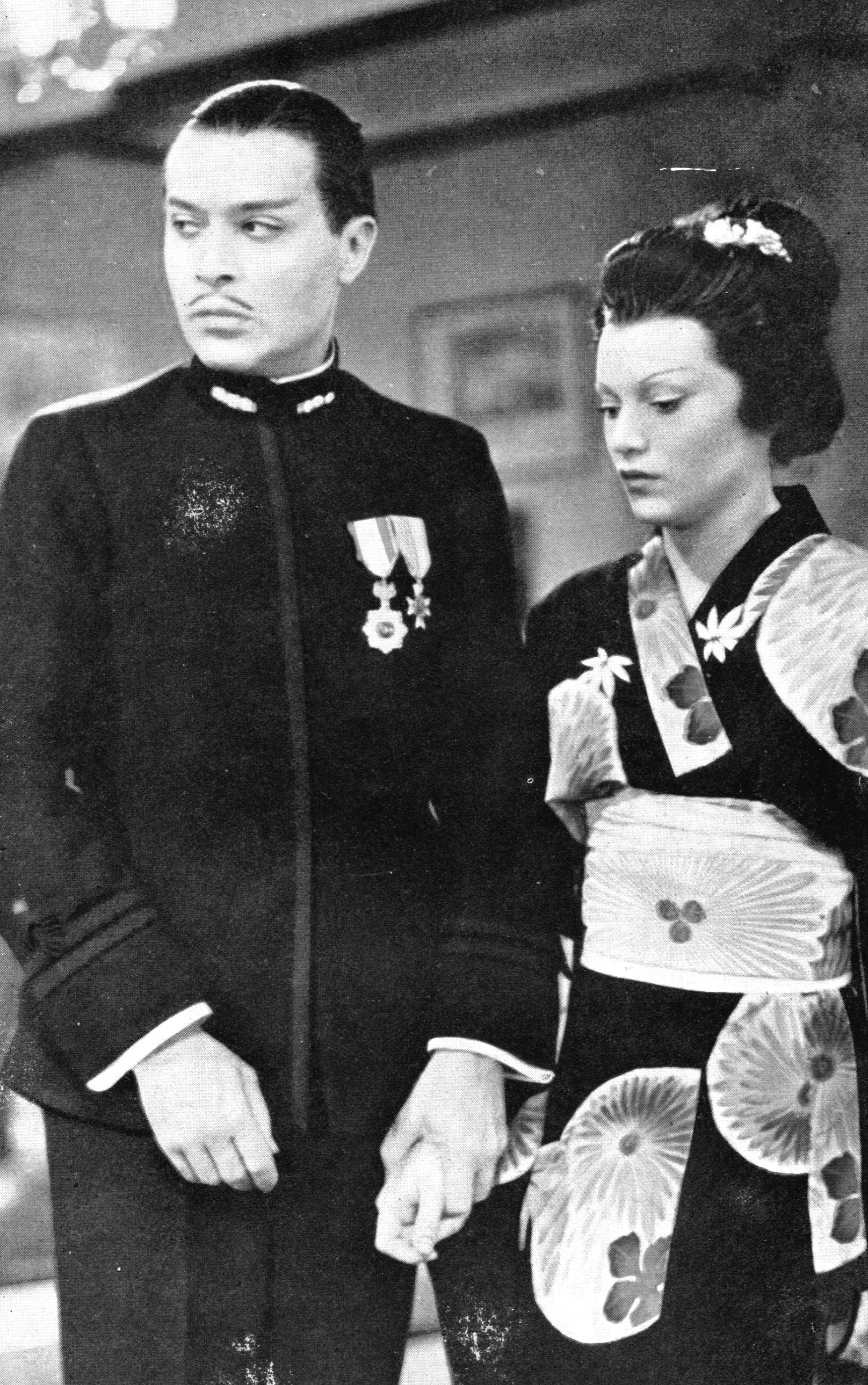 La battaglia,. (Farkas + Touriansky, 1933). Charles Boyer + Annabella - foto scena